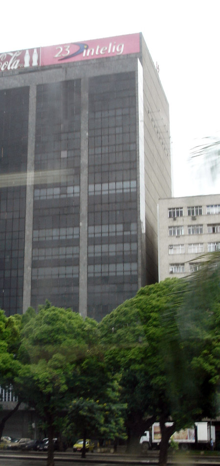 Foto do headquarters da Intelig Telecom na Praia de Botafogo, Rio de Janeiro.